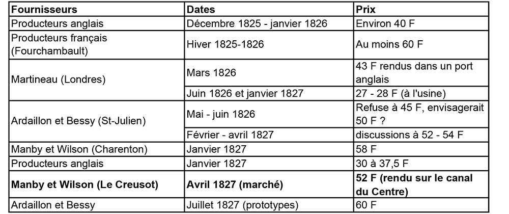 Les prix des rails en fer, français et anglais (en francs courants aux 100 kgs).